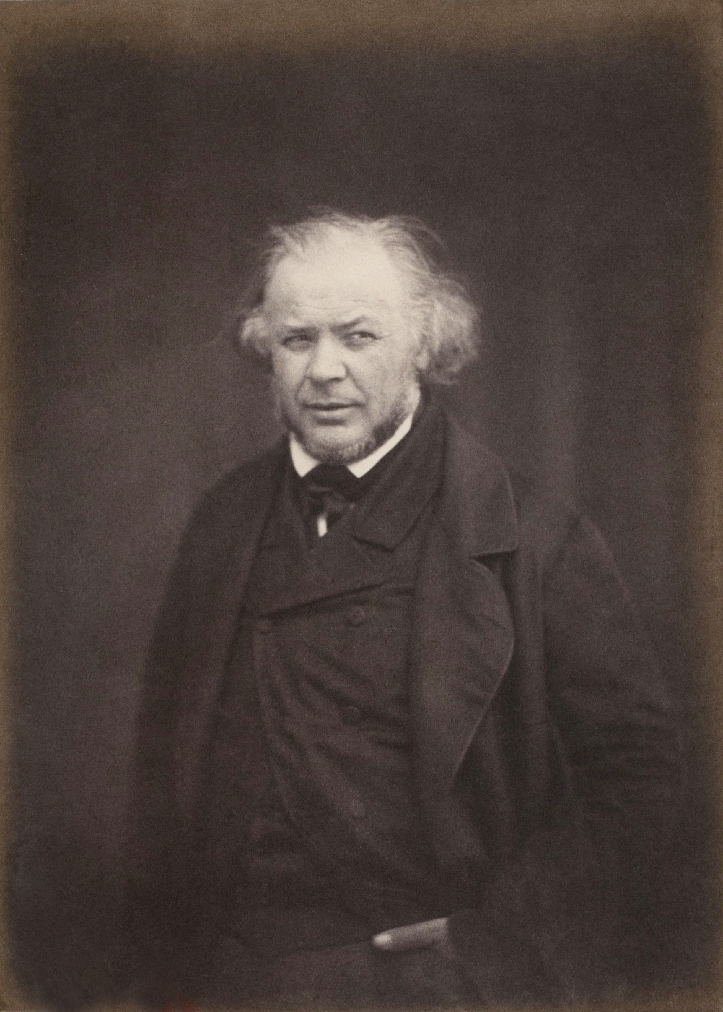 Honoré Daumier